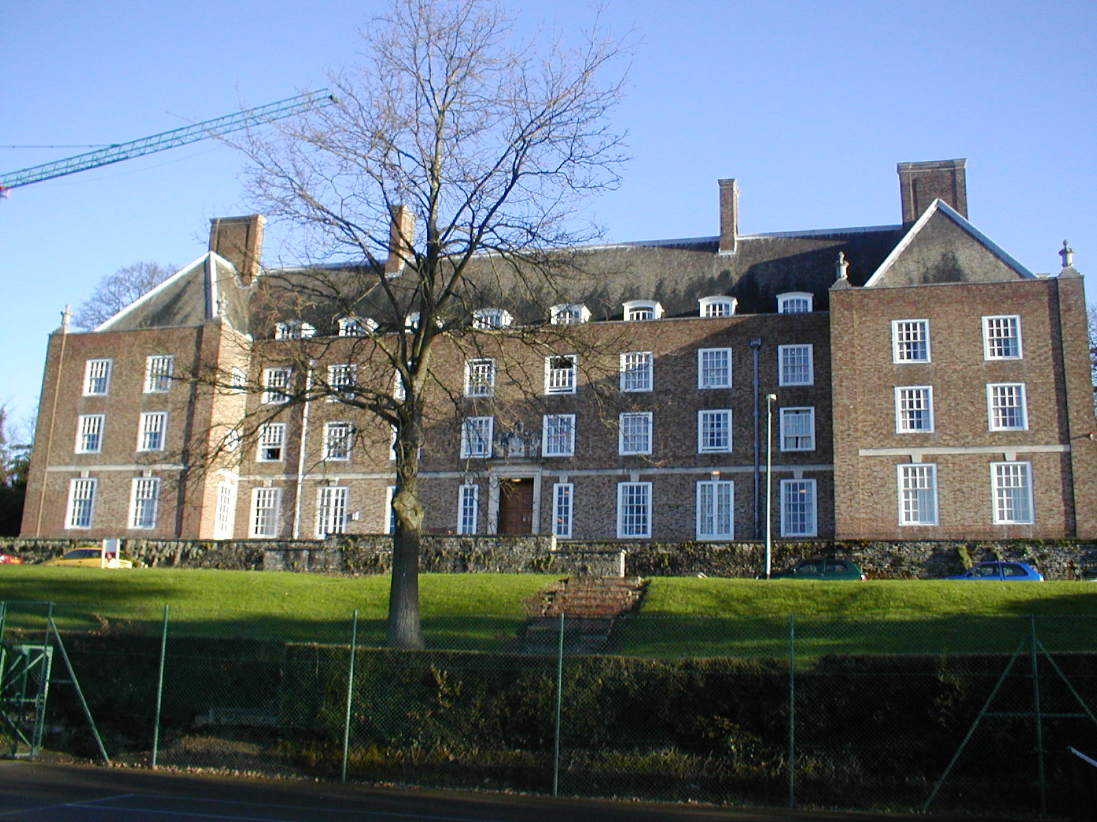 Mardon